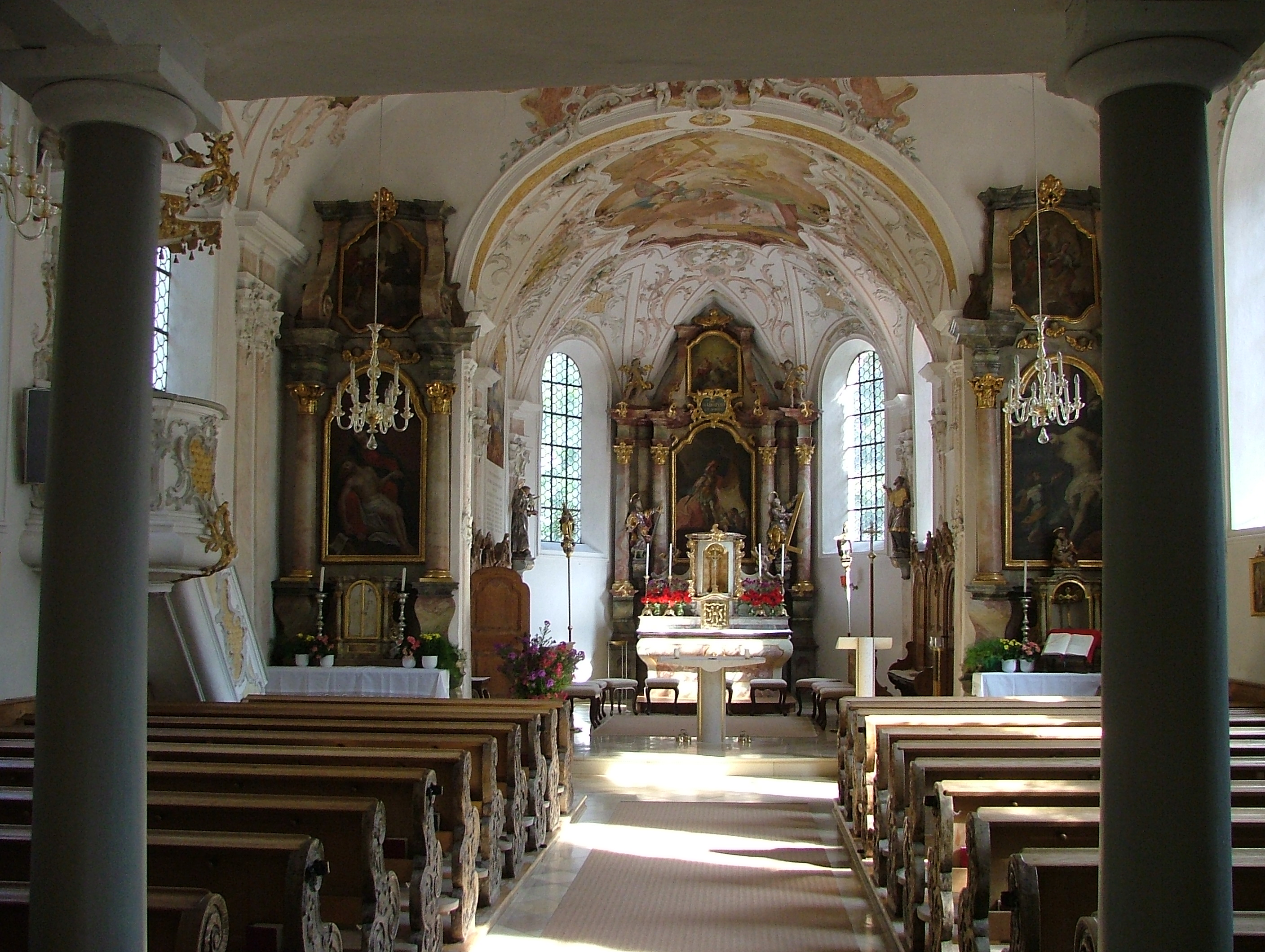 Obermeitingen